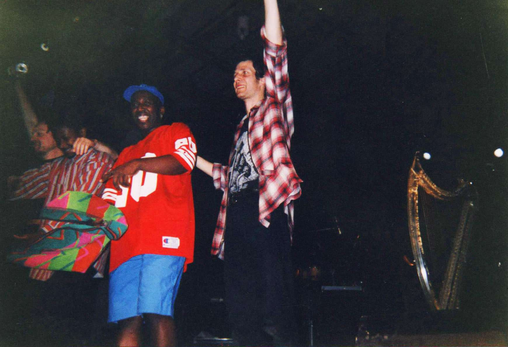 Felix Sabal-Lecco à Mayenne, lors de la tournée Brian Boru d'Alan Stivell.